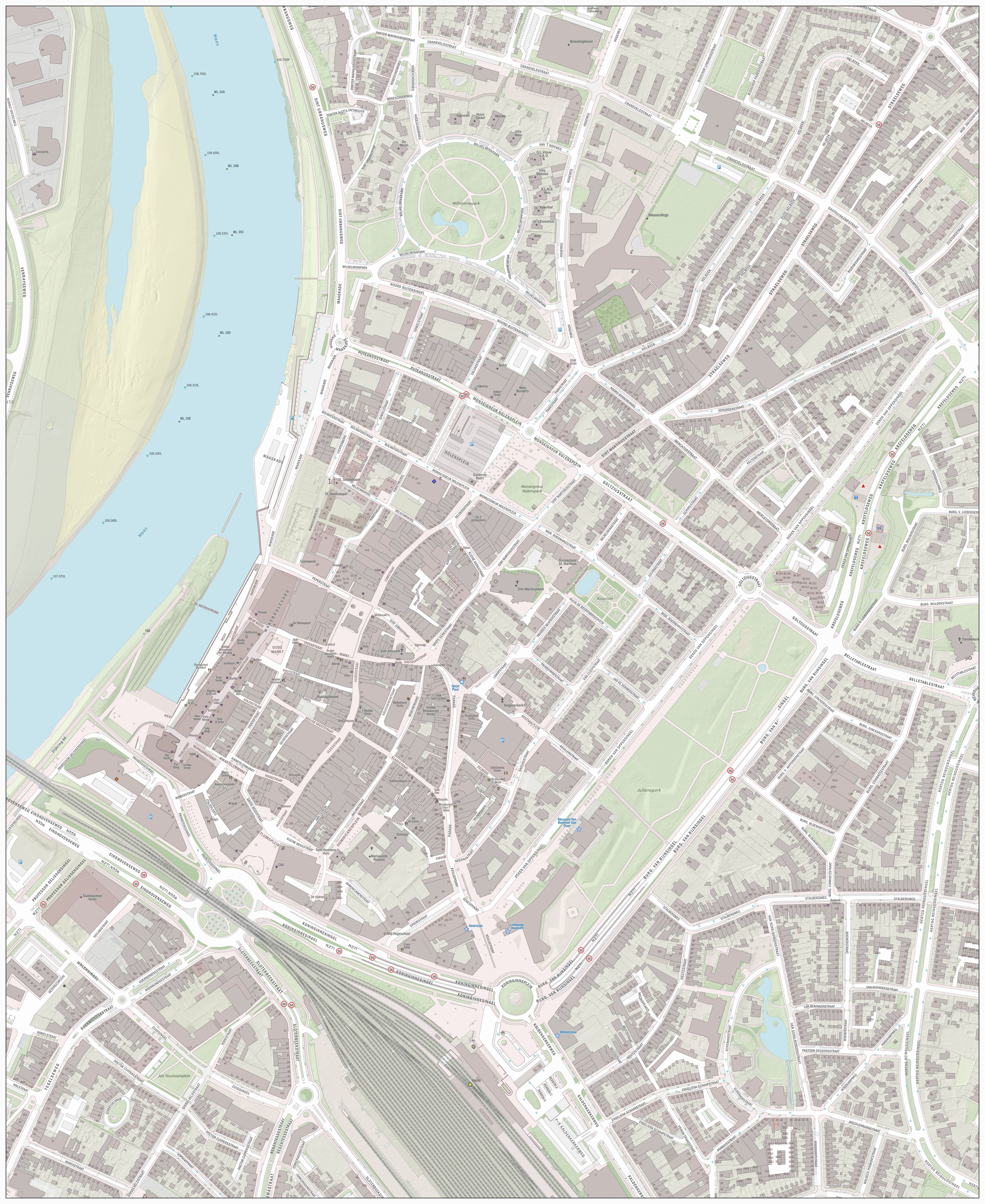 Topografische kaart van Venlo (centrum van woonplaats). Resolutie: 2688 pixels/km. Kaartbeeld samengesteld uit de open geodata van de Basisregistratie Grootschalige Topografie (BGT), Creative Commons-BY Kadaster, en Top10NL en Top25namen (Basisregistratie Topografie, Kadaster), Creative Commons-BY Kadaster. Gebouwvlakken uit open geodata BAG extract, Creative Commons-BY Kadaster. Wegen uit de OpenStreetMap, CC-BY OpenStreetMap bijdragers. Reliëfschaduw uit de Actuele Hoogtekaart AHN2/AHN3. Samenstelling en kleurenschema: Jan-Willem van Aalst, met QGIS2. Zie ook de Legenda.